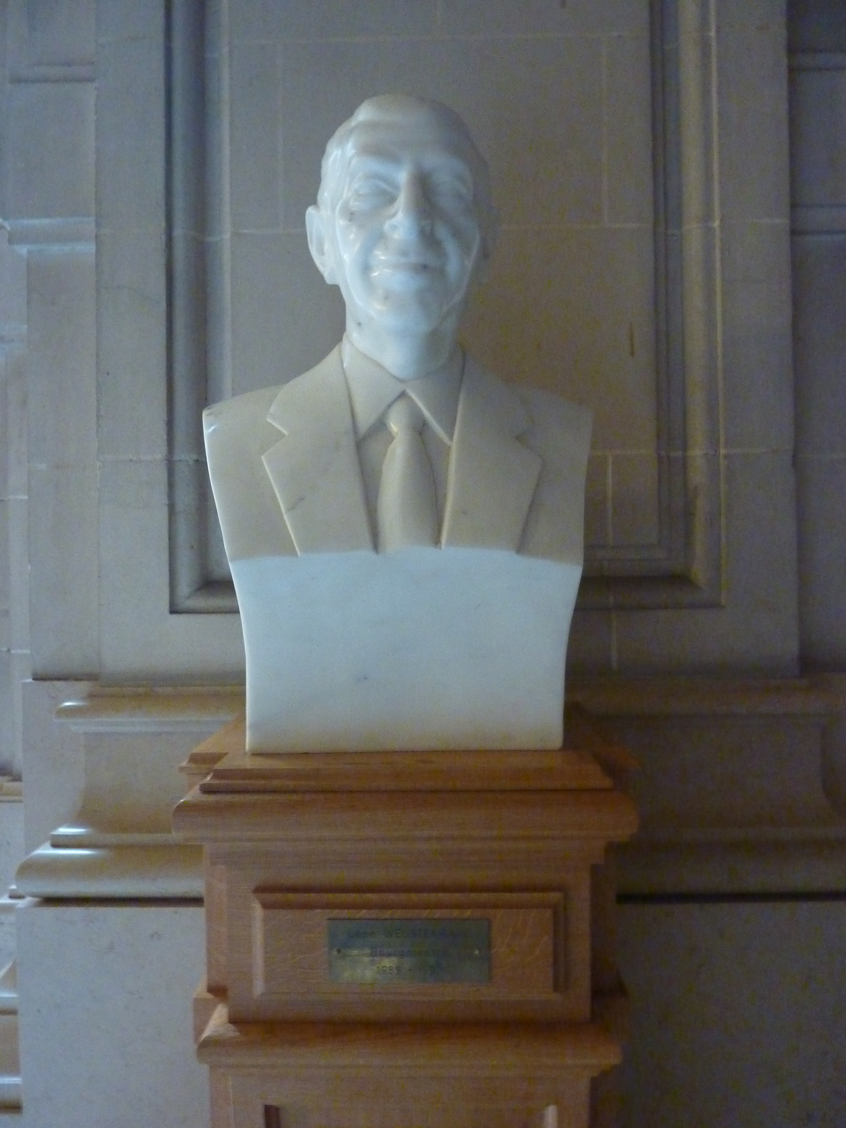 Léon Weustenraad